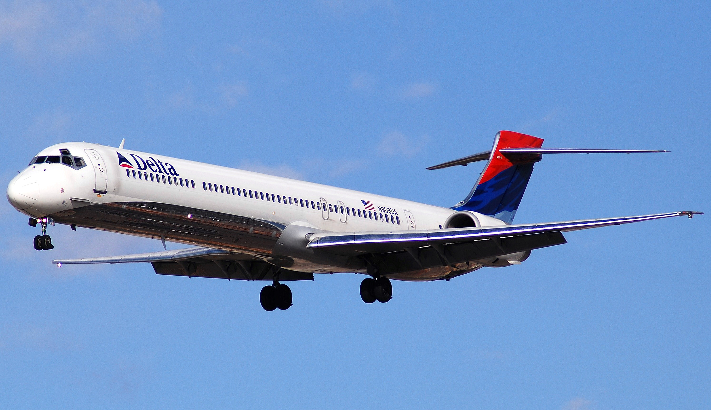 N908DA